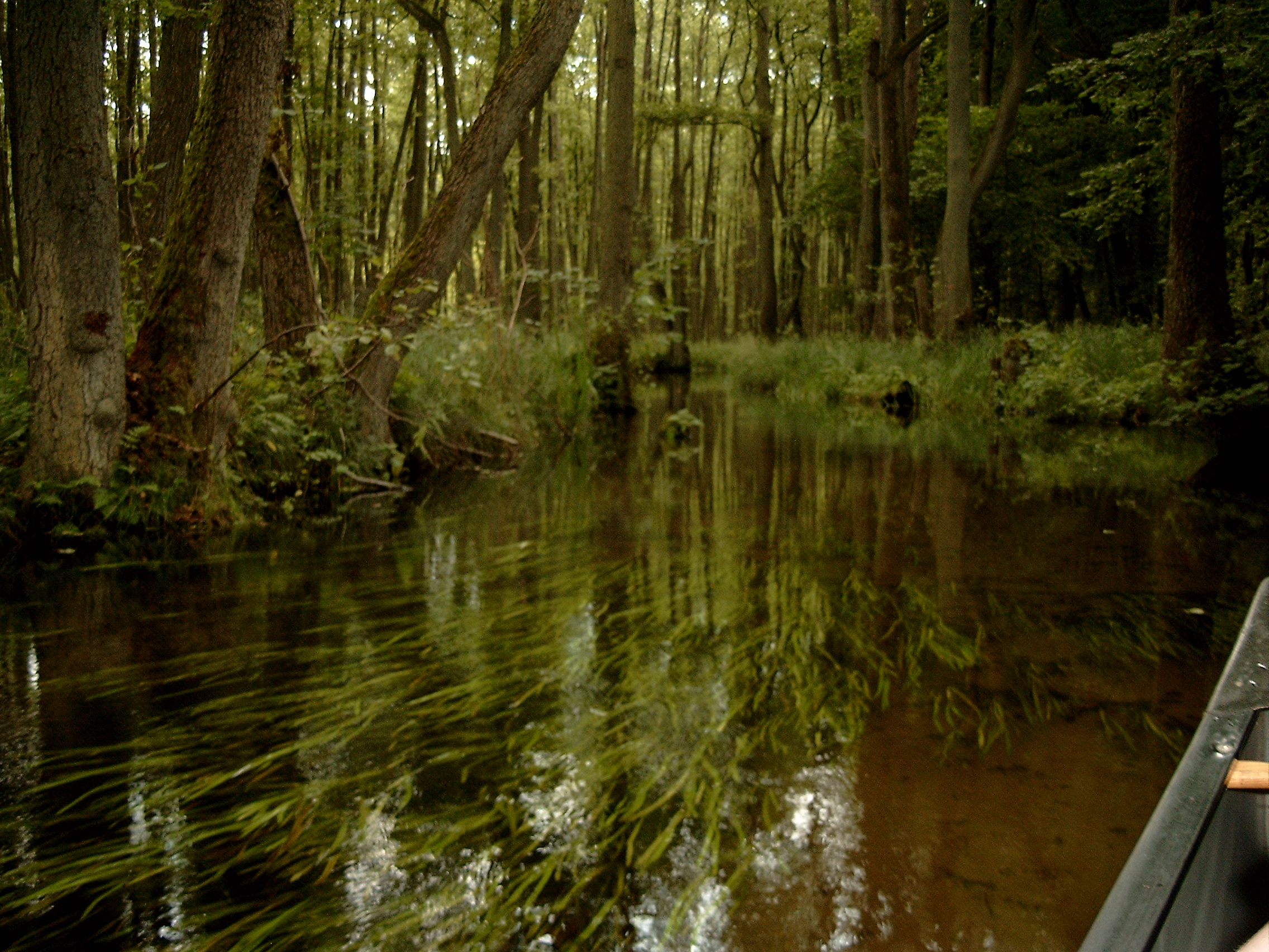 Küstriner Bach bei Lychen (Landkreis Ukermark, Brandenburg).